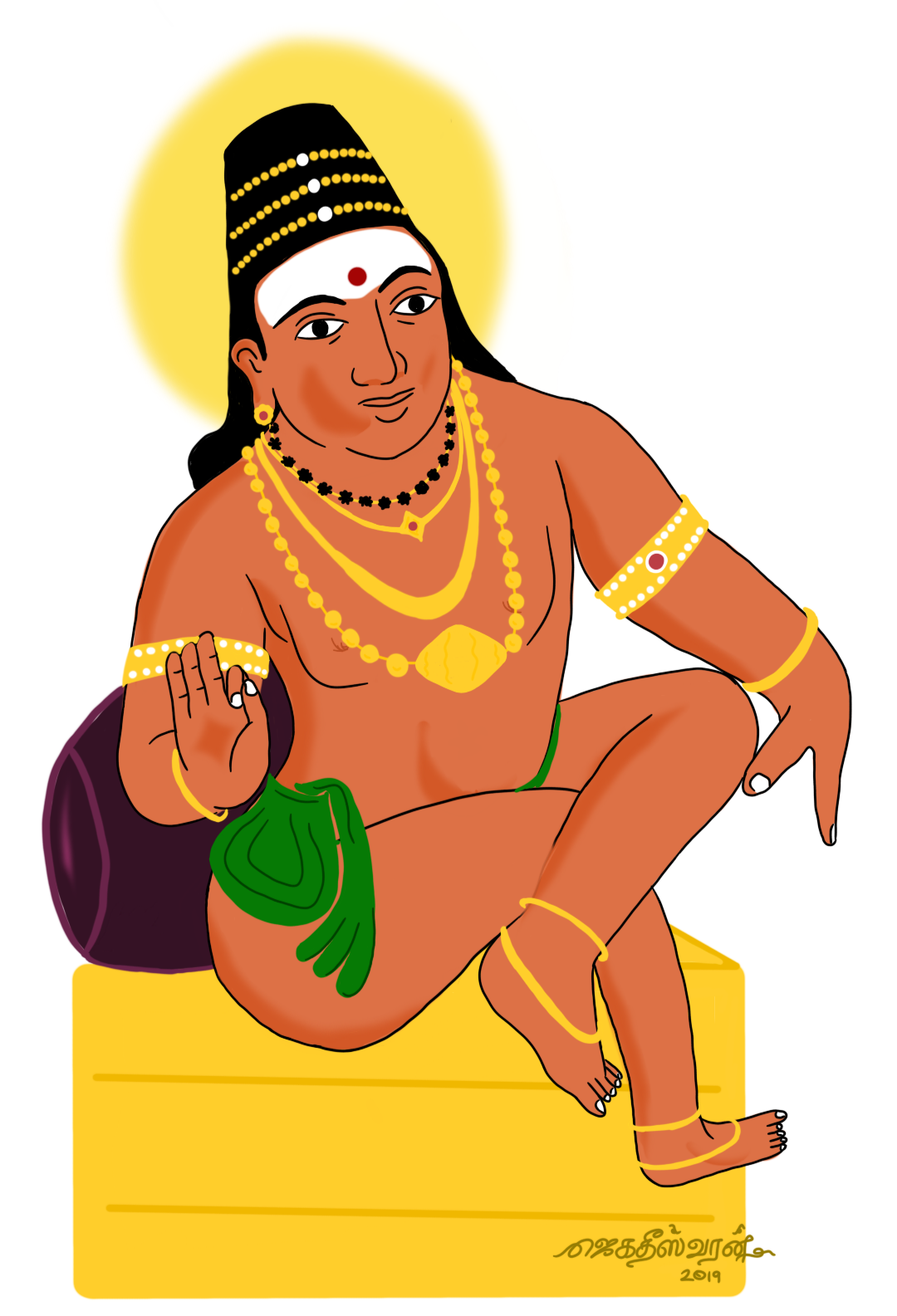 குகை நமச்சிவாயர் டிஜிட்டல் ஓவியம்